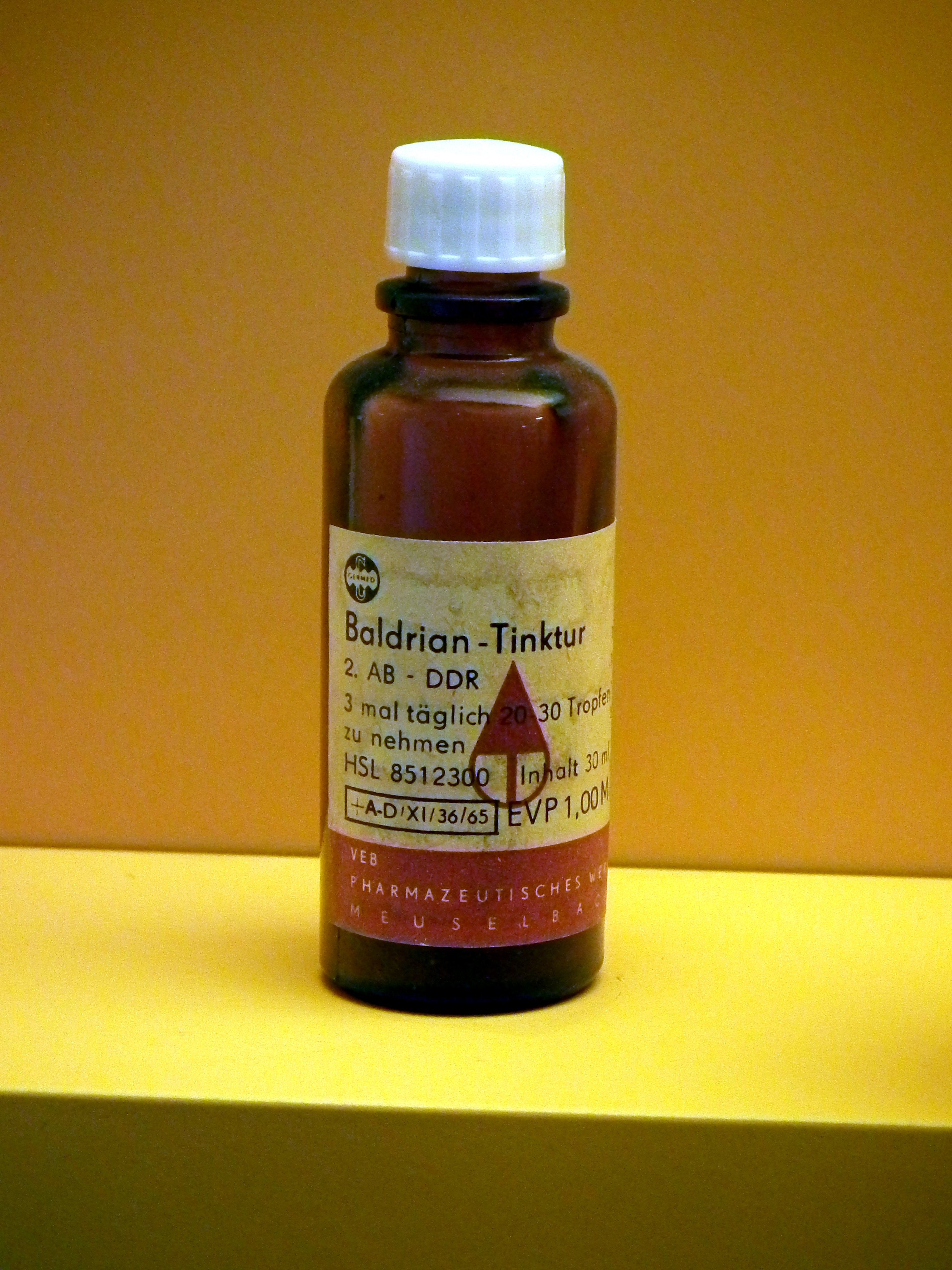 Baldrian-Tinktur (GERMED, VEB Pharmazeutisches Werk Meuselbach), aufgenommen im Nudelmuseum Riesa